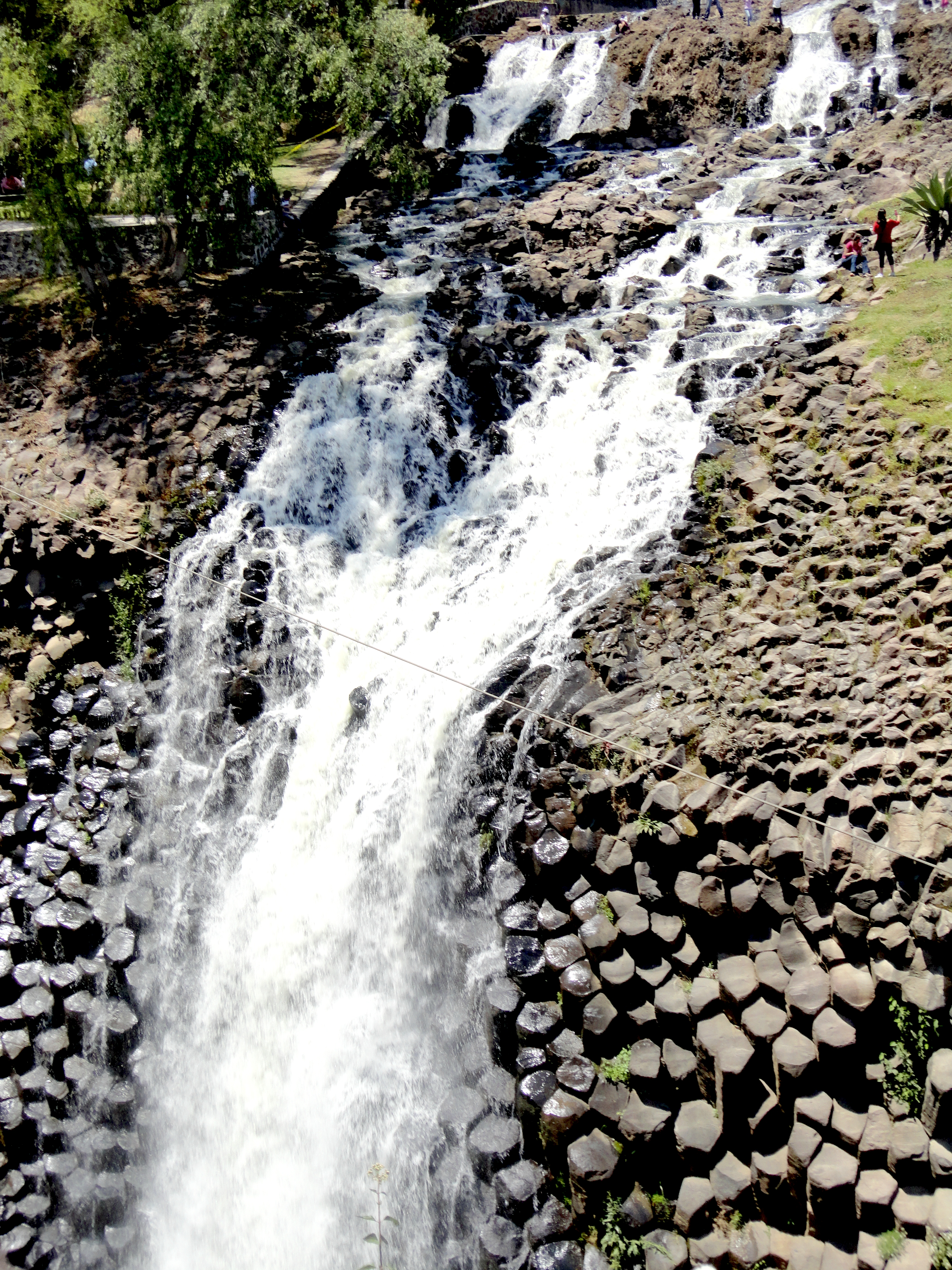 Cascada en los Prismas Basálticos de Santa María Regla - Huasca de Ocampo, Hidalgo, México.